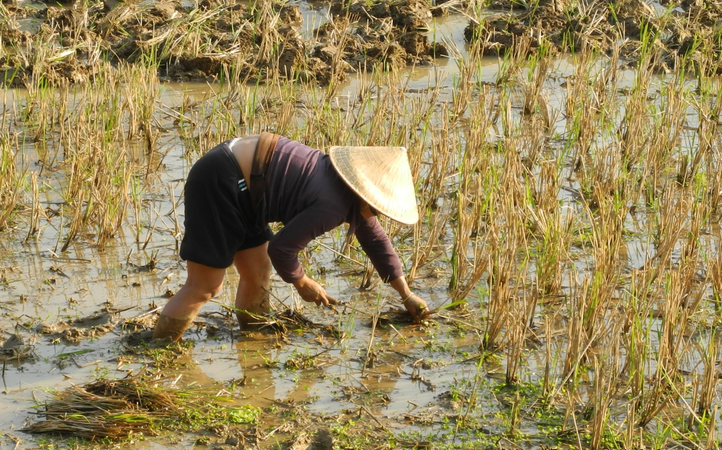 Mai Chau-Arbeit im Reisfeld